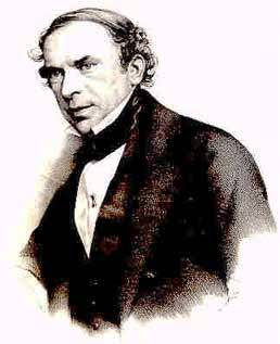 Ludolf Camphausen (preußischer Ministerpräsident 1848)